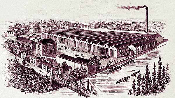 "Vue générale de l'usine de teinturerie et de préparation de la laine Gustave Hue à Elbeuf, en-tête de papier à lettre, vers 1900."